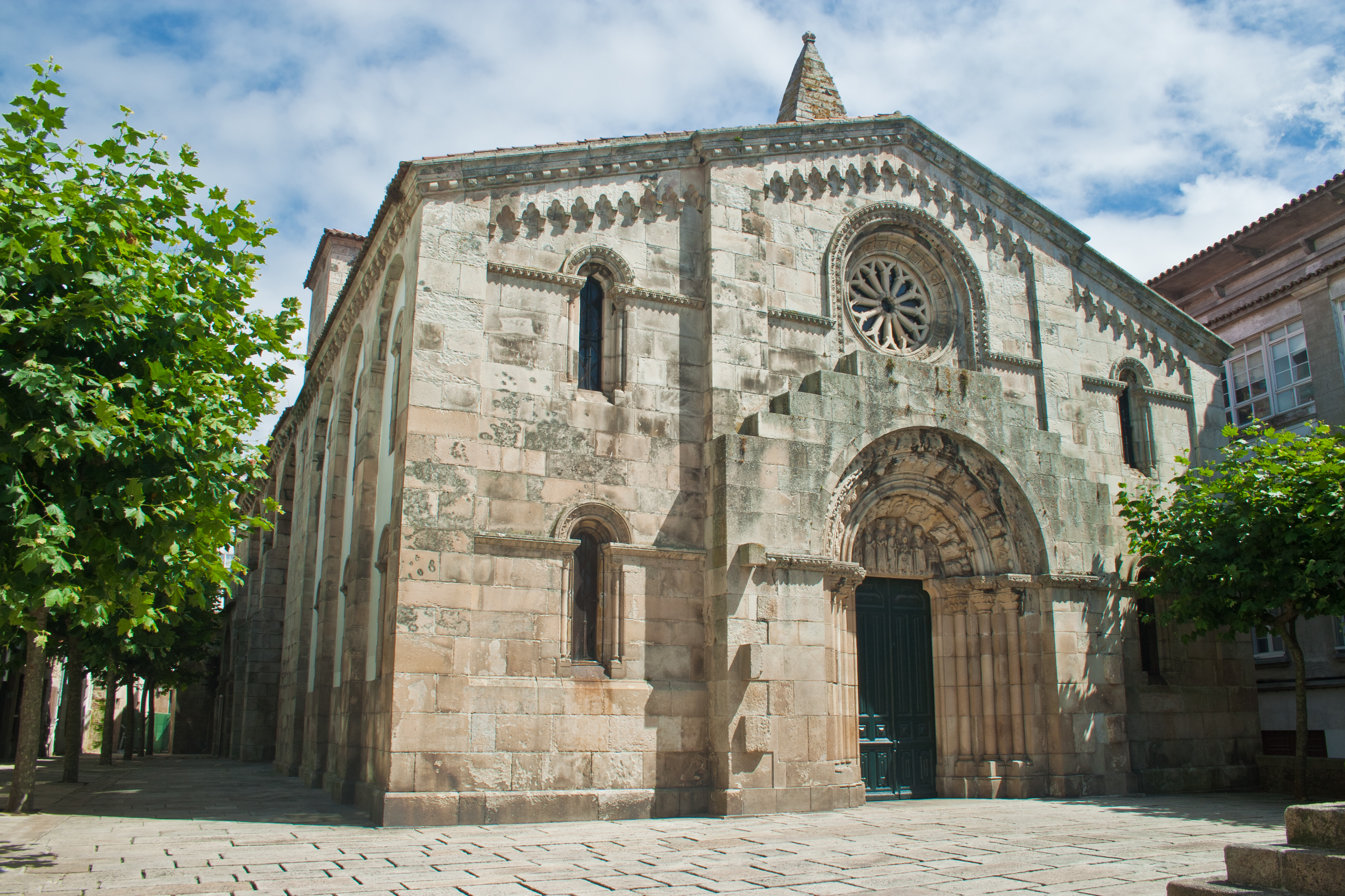 Fachada de la Colegiata de Santa María del Campo